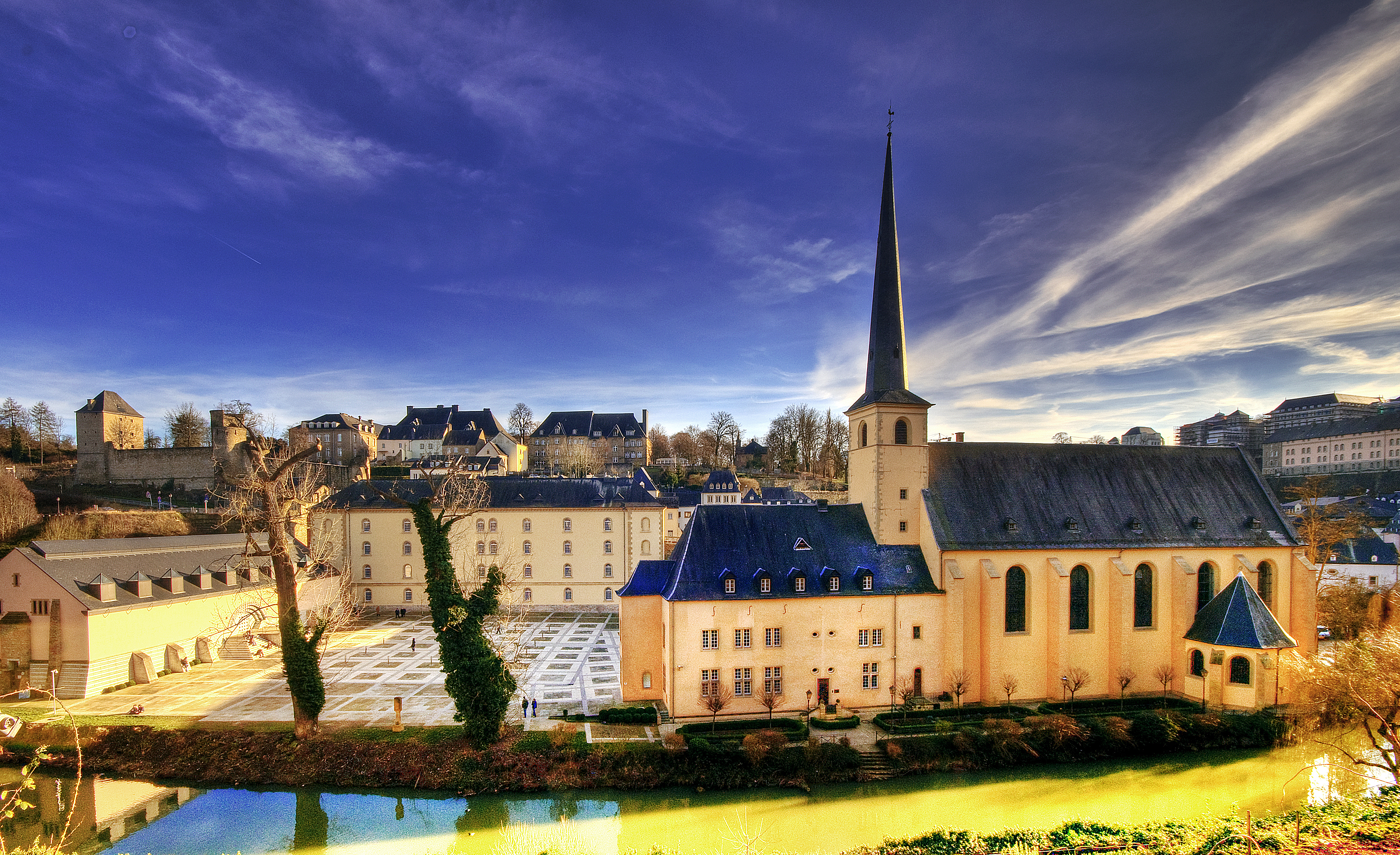 Luxembourg Abbaye de Neumünster. See thelarge view! Die Abtei Neumünster befindet sich im Stadtteil Grund in Luxemburg (Stadt) am Ufer der Alzette. Nachdem die alte Benediktinerabtei Altmünster 1542 während des Krieges zwischen Frankreich und Deutschland schwer beschädigt worden war, errichteten die Benediktinermönche 1606 ihre neue Abteikirche im Stadtteil Grund. Nach der Enteignung der Johanneskirche durch die französische Revolutionsbehörden Ende des 18. Jahrhundert richtete man in der Abtei bis 1867 ein Militärhospital ein. Im Anschluss an die Übernahme durch den Luxemburger Staat diente der Gebäudekomplex bis 1980 als Männergefängnis. Nach größeren Restaurierungsarbeiten wurde die gesamte Anlage soziokulturellen Zwecken zugeführt und bildet heute den "Kulturtreffpunkt Neumünster". From Wikipedia, the free encyclopedia